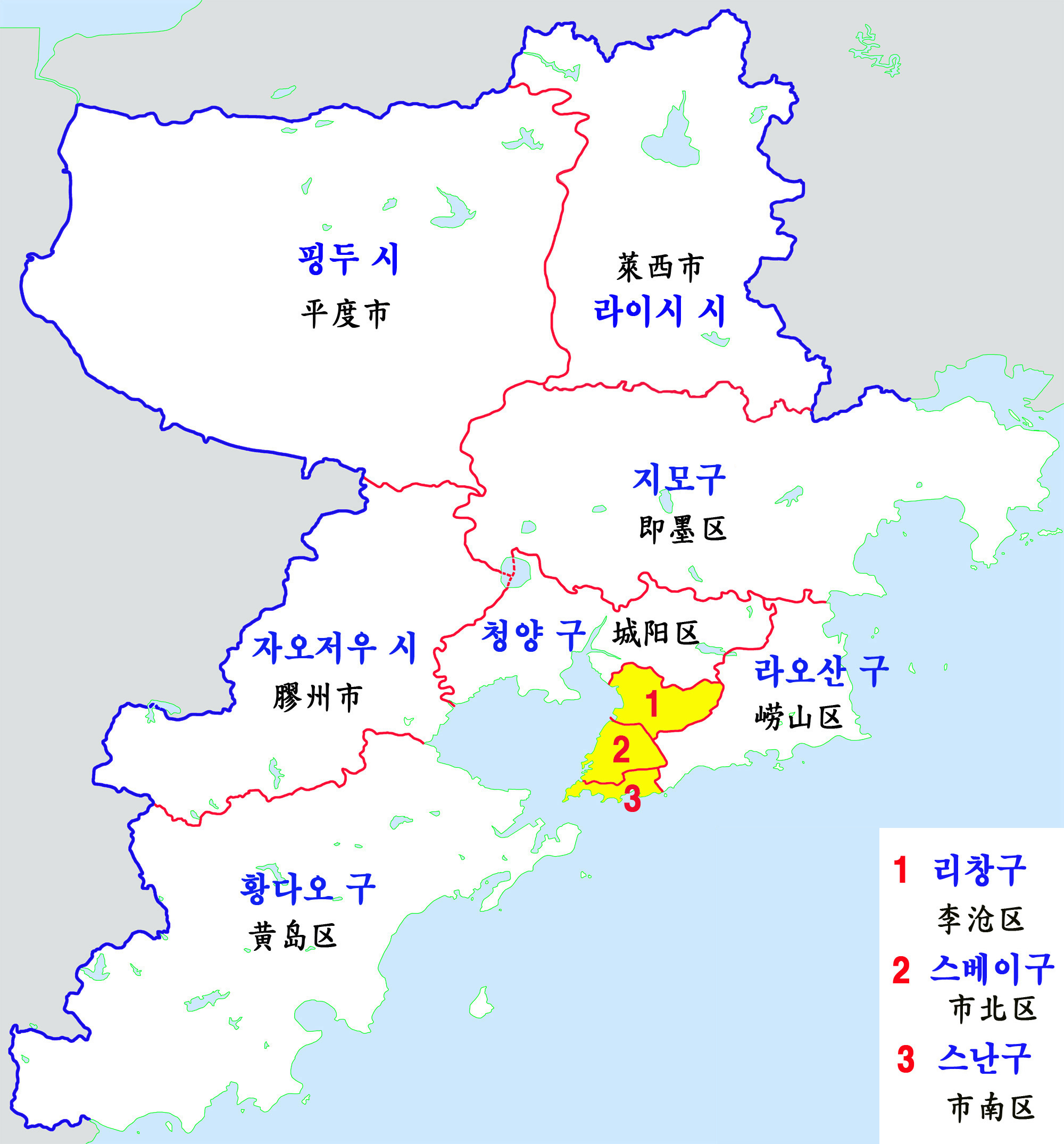 산둥성 칭다오시 행정구역